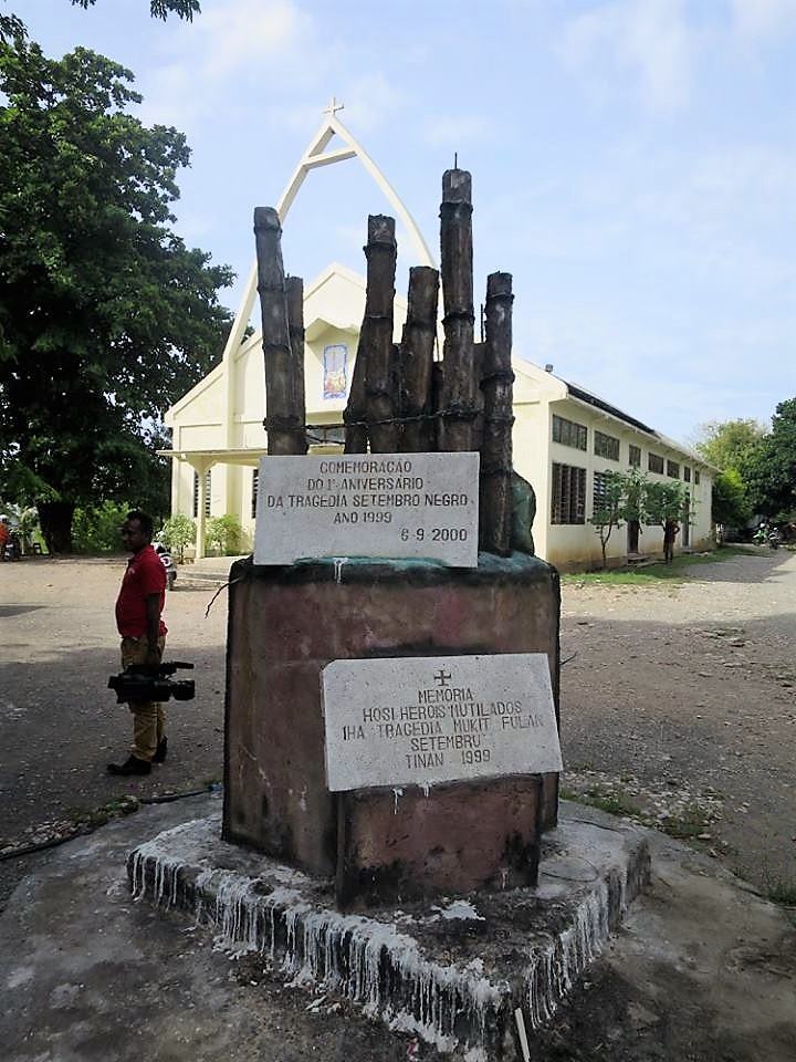 Denkmal an das Kirchenmassaker von Suai vor der Kirche Nossa Senhora do Rosario